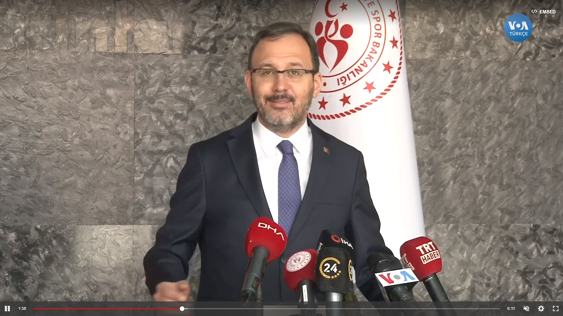 Gençlik ve Spor Bakanı Muharrem Kasapoğlu